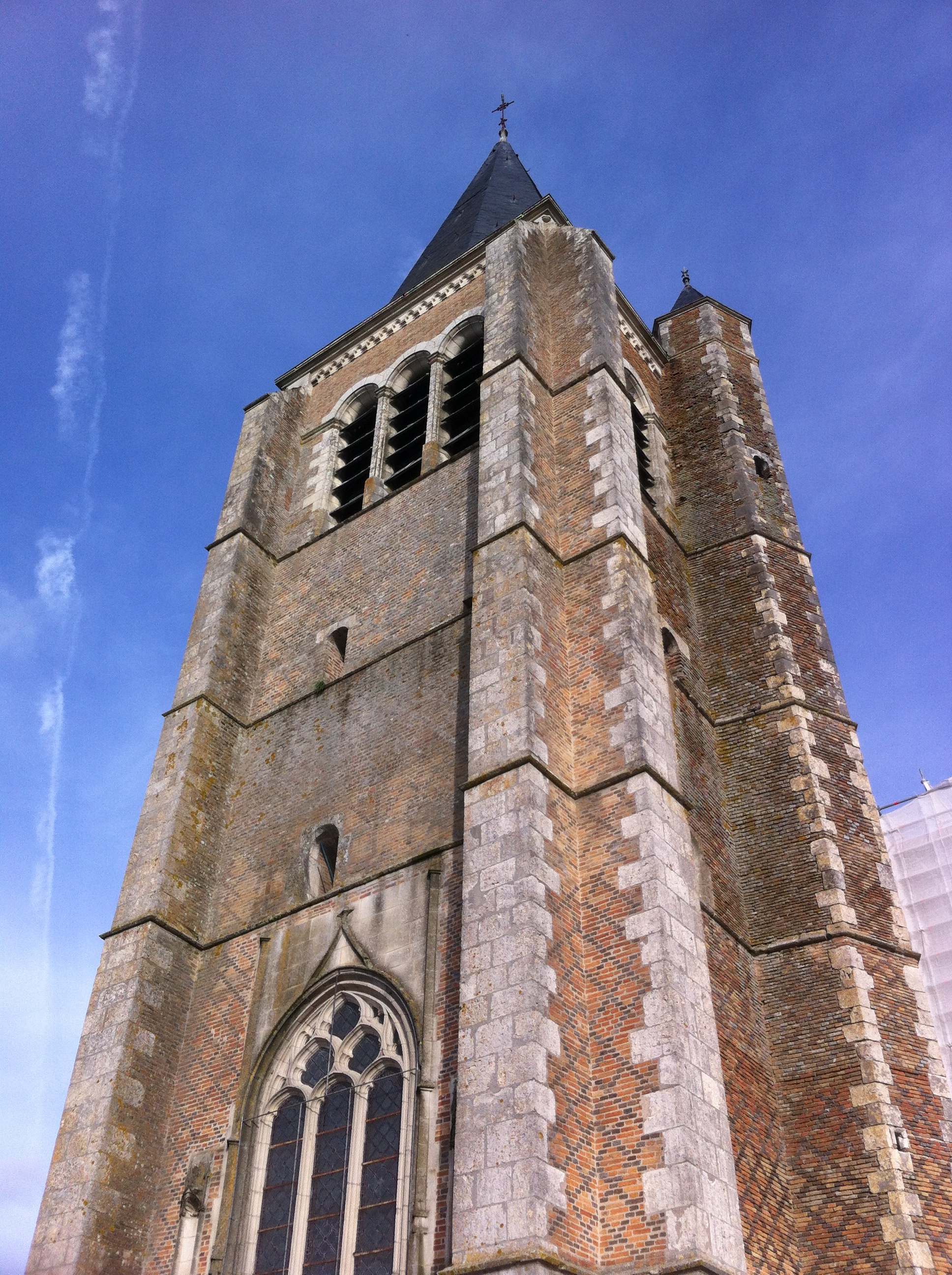 Le clocher de l'église Saint Pierre de Vouzon.